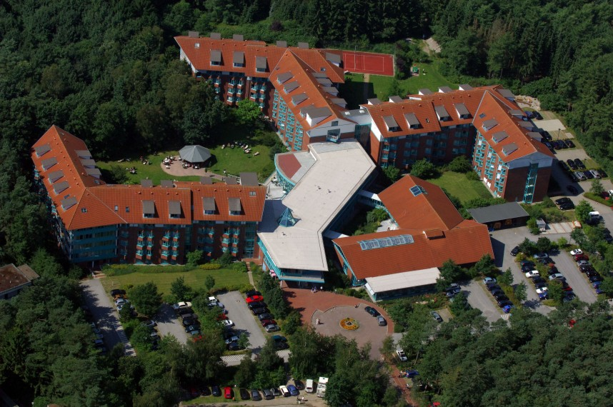 Luftaufnahme Psychosomatische Klinik Bad Bramstedt